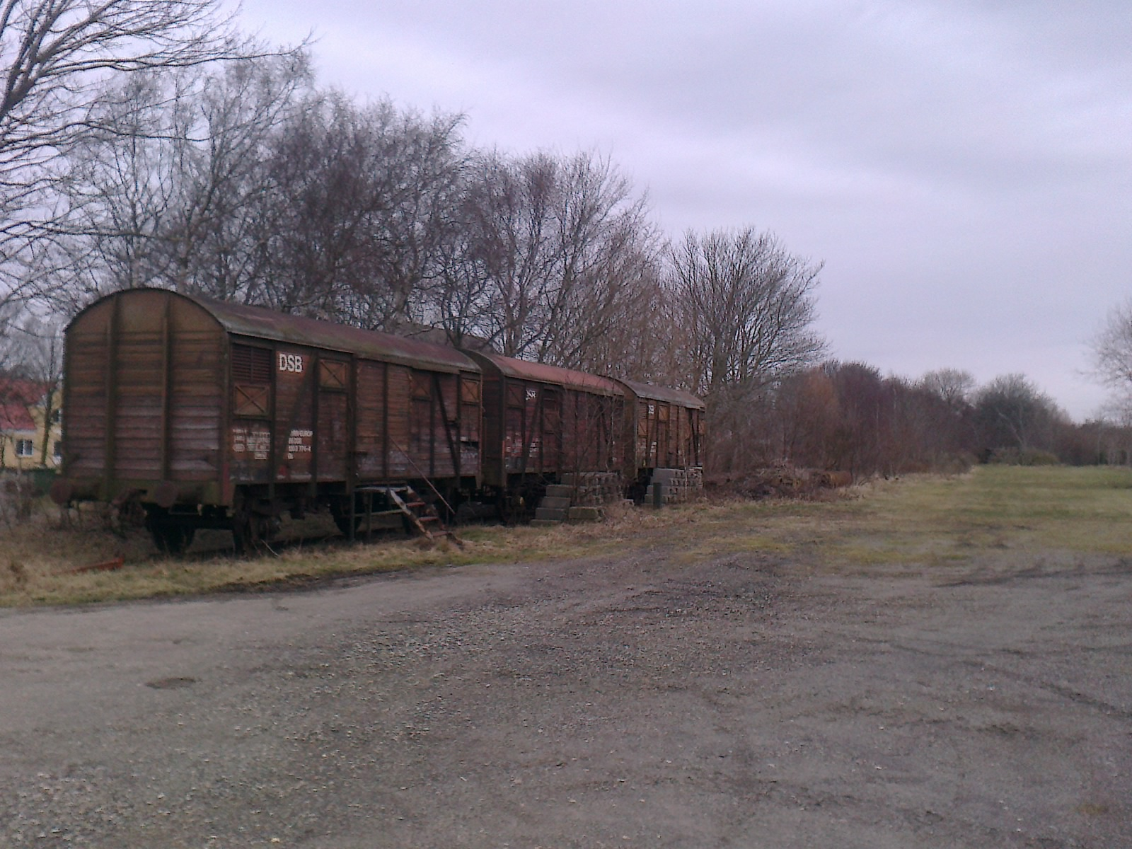 På banesiden af Herborg Station står tre godsvogne. En sti fortsætter th. for sporet til Skolevej